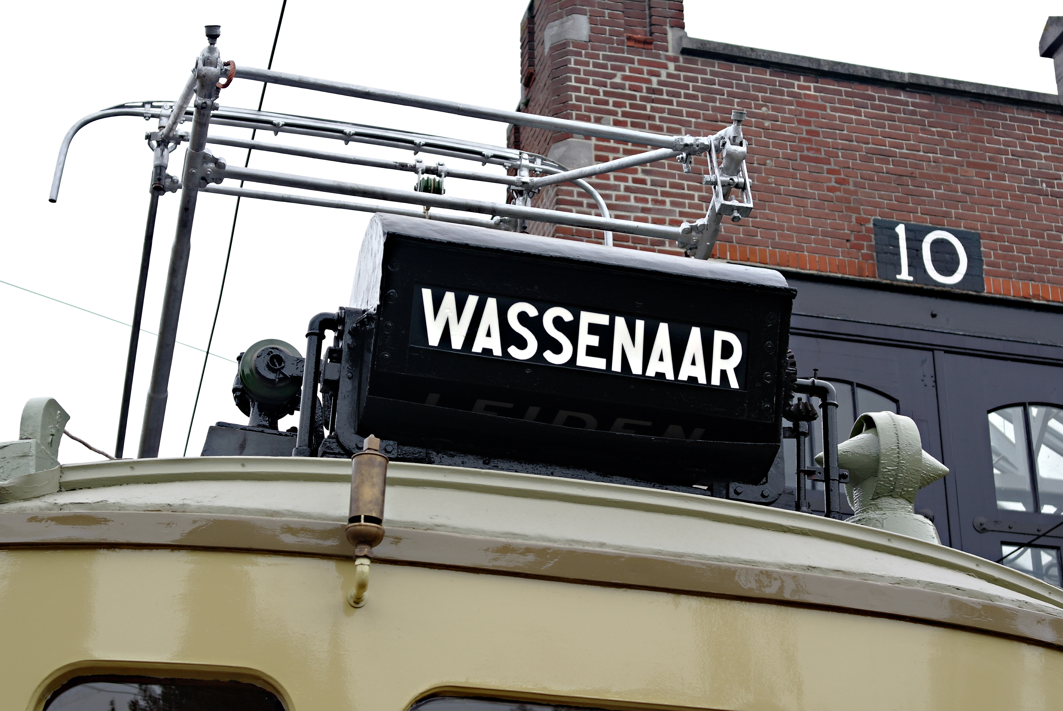 Front van motorwagen 90 met fluit en koerstrommel